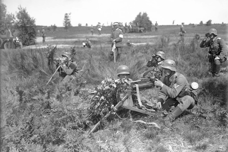 Die grossen Reichswehrherbstmanöver im Kreis Frankfurt a/O. unter Anwesenheit des Chefs der Heeresleitung Generaloberst Heye! Eine Maschinengewehr-Stellung, getarnt mit Feldlaub gegen Fliegersicht und Beobachtungsposten im Manövergelände.